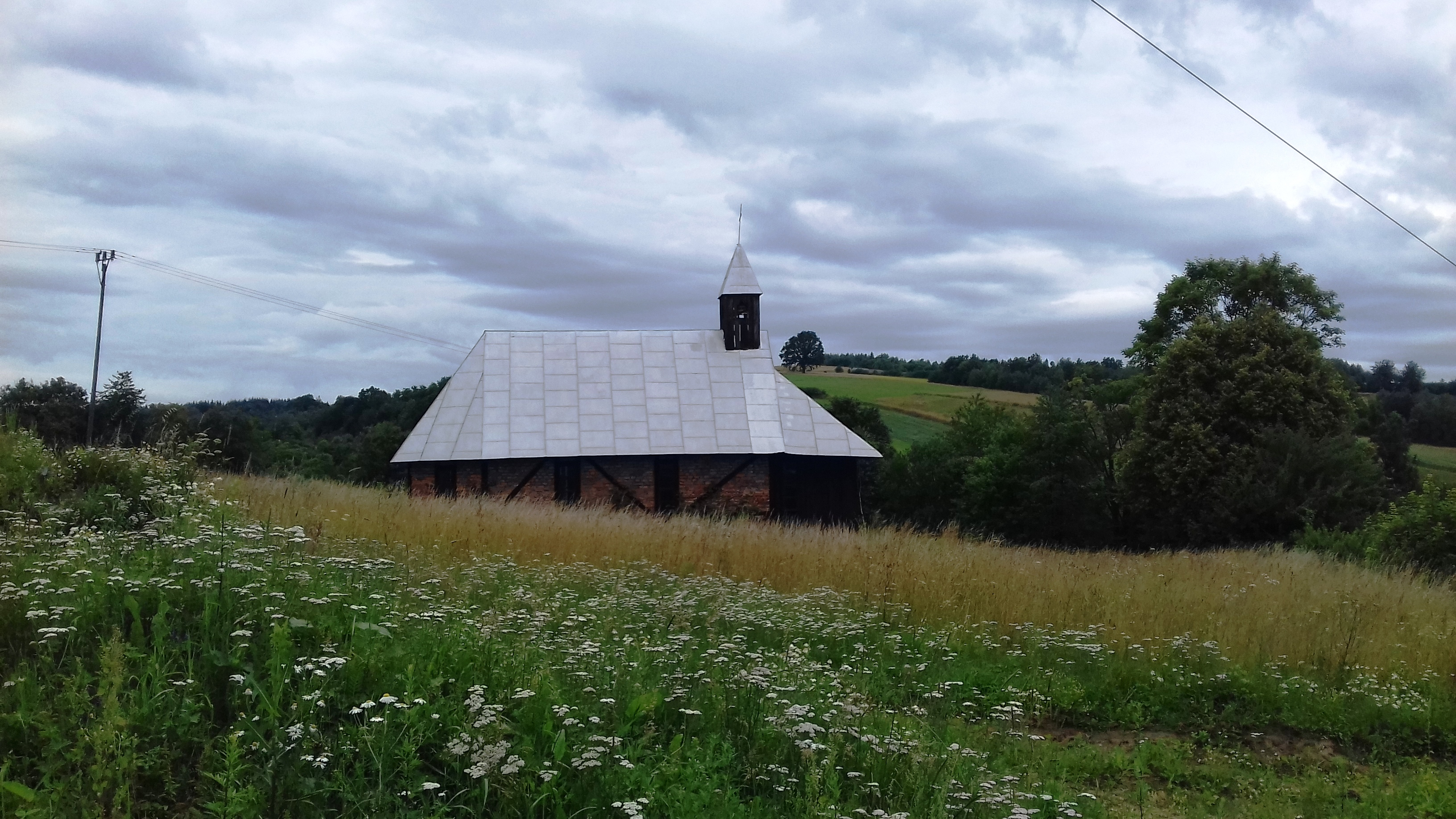 Końskie (gm. Dydnia, pow. Brzozów) - kościółek Św. Andrzeja Boboli